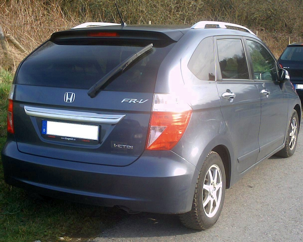 Honda FR-V